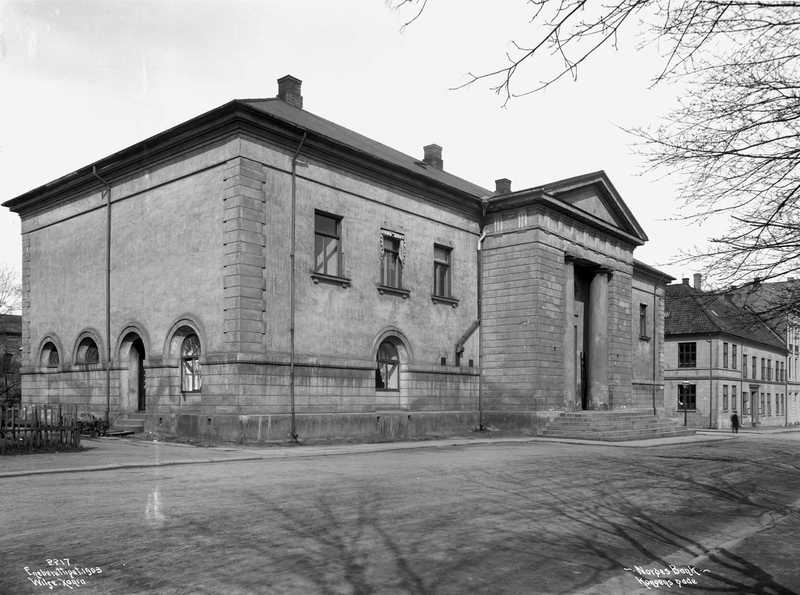 Norges Bank tegnet av Christian H. Grosch.